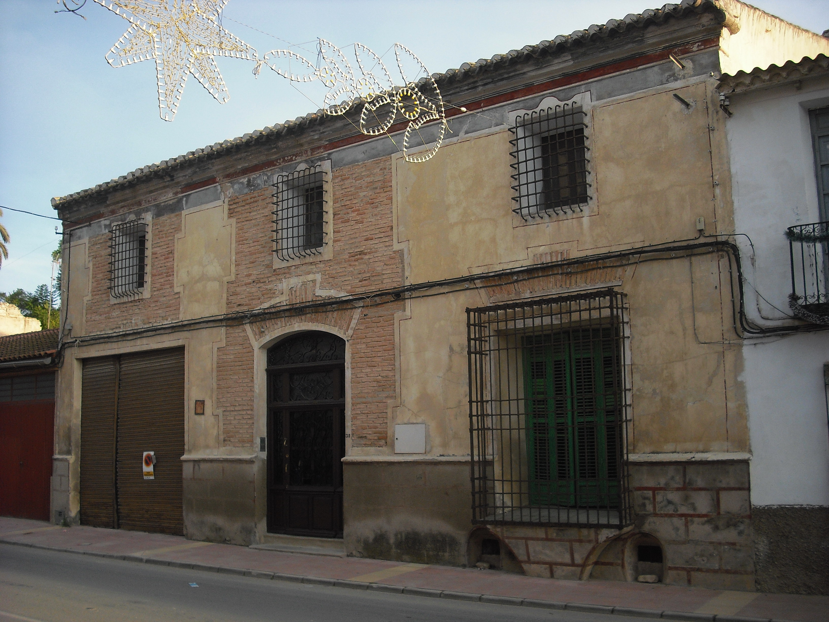 casa marques